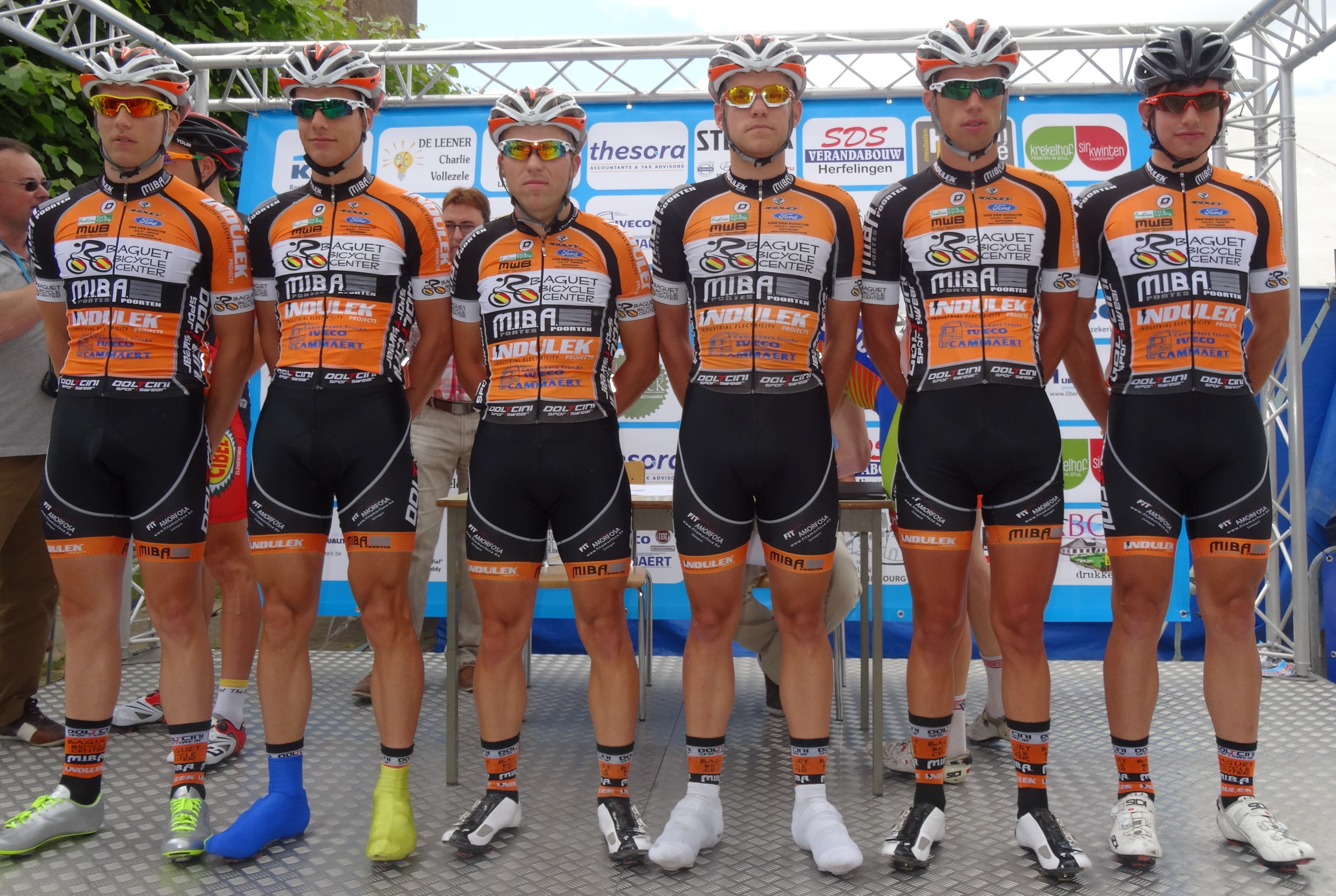 Reportage photographique réalisé le mercredi 25 juin à l'occasion du départ et de l'arrivée de l'Internationale Wielertrofee Jong Maar Moedig 2014 à Oetingen (Gooik), Belgique.